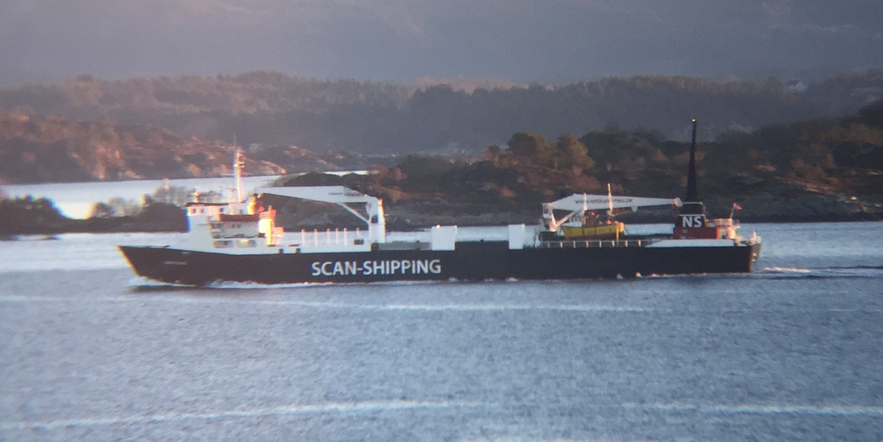 Karmsund i Korsfjorden